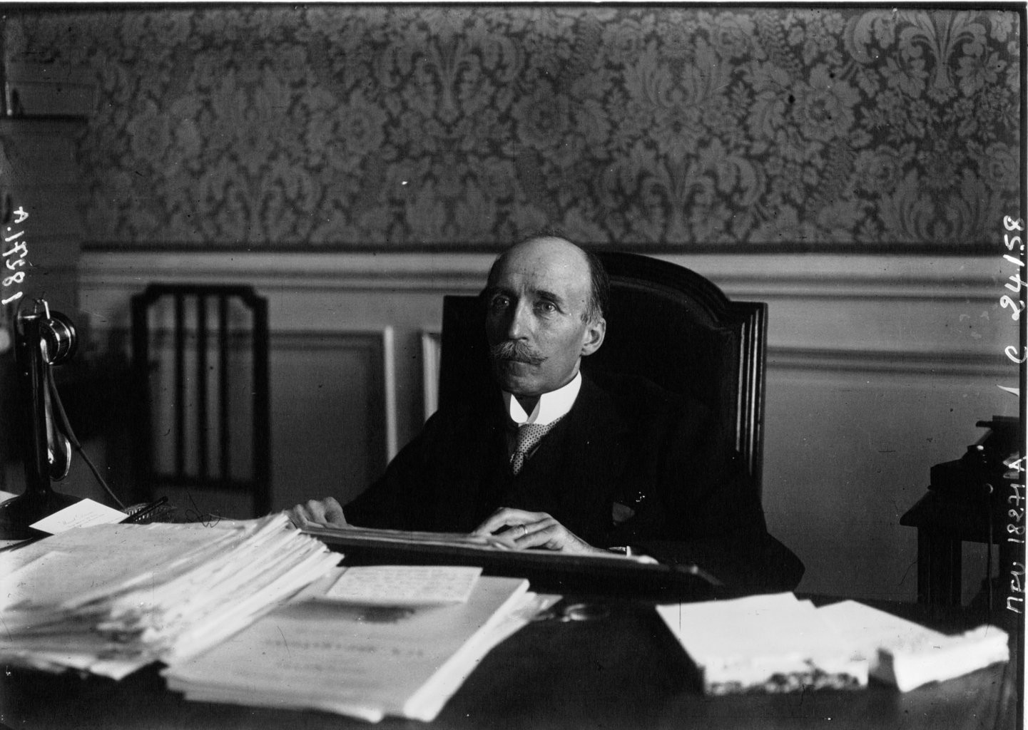 M. Seydoux, Directeur politique adjoint au Quai d'Orsay - à son bureau